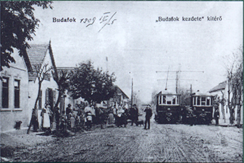 A nagytétényi HÉV Budafok kezdete nevű kitérője Budafokon nagyjából a mai Budafok kocsiszínnél